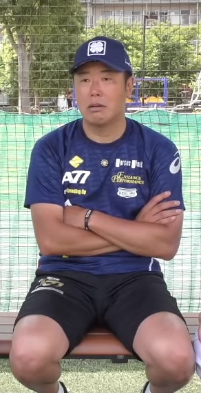 高木豊のYouTubeチャンネル動画に出演する野村弘樹